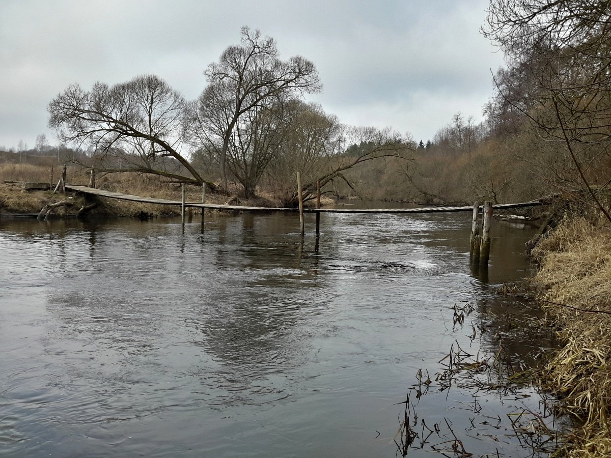 Межыца (Лепельскі раён). Падвясны мост